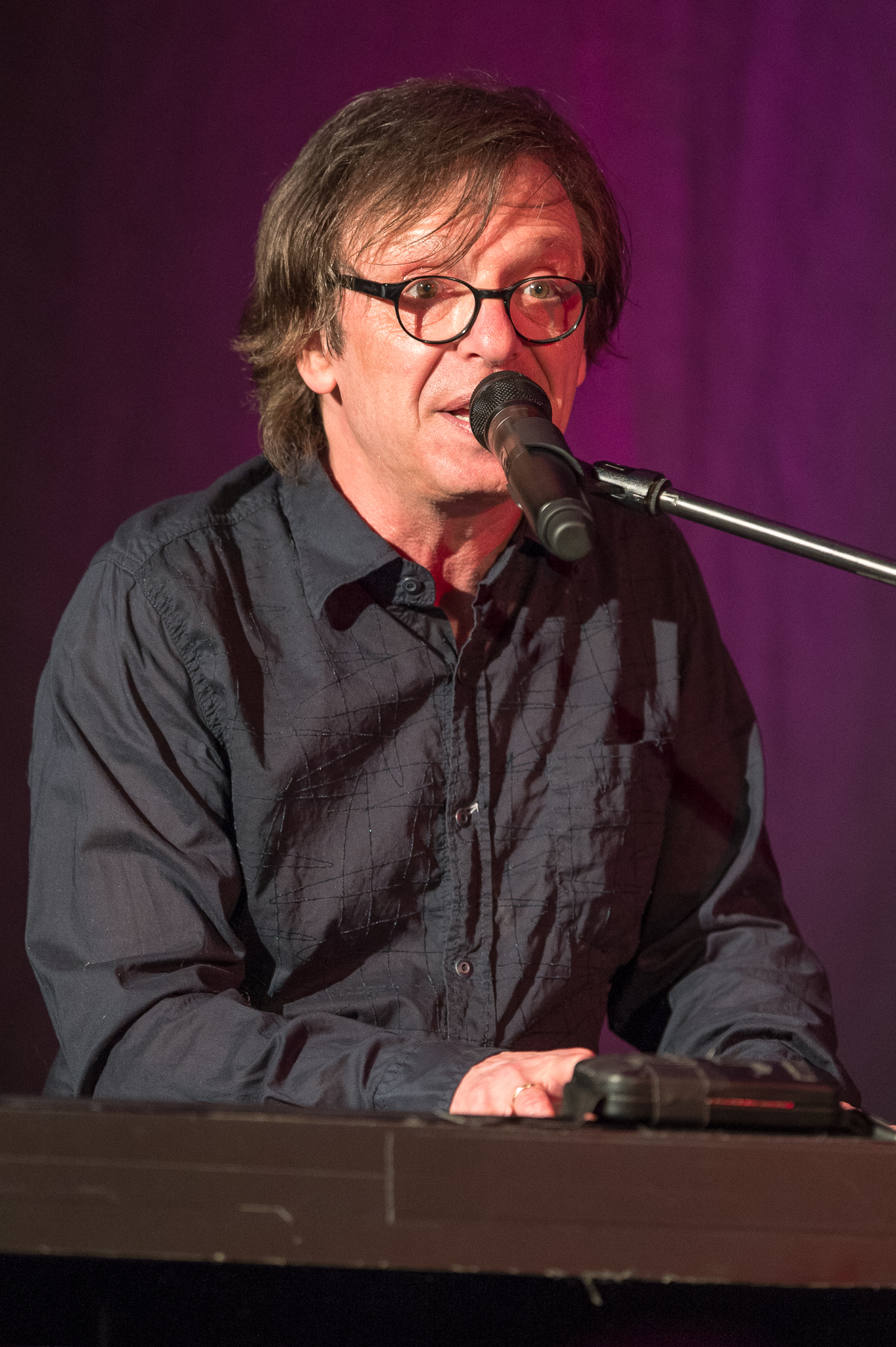 Concertbüro Franken,Gutmann am Dutzendteich,Konzert,Livekonzert,Livemusik,Musik,Purple Schulz,Rüdiger Schulz